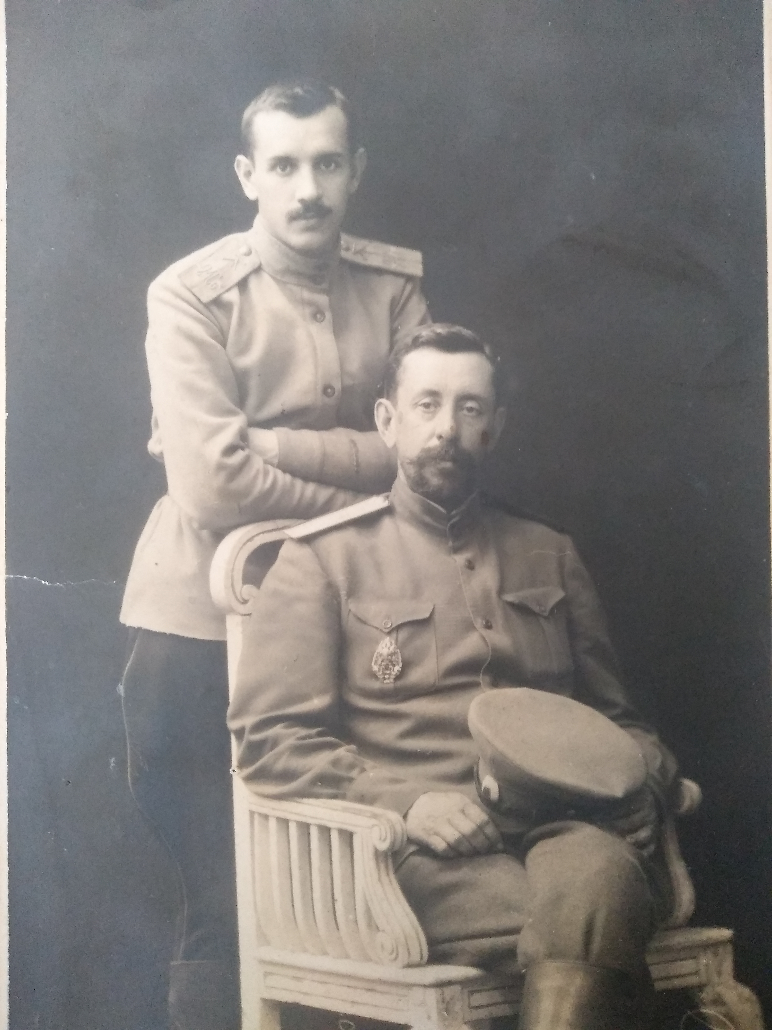 Николай Александрович с сыном Михаилом